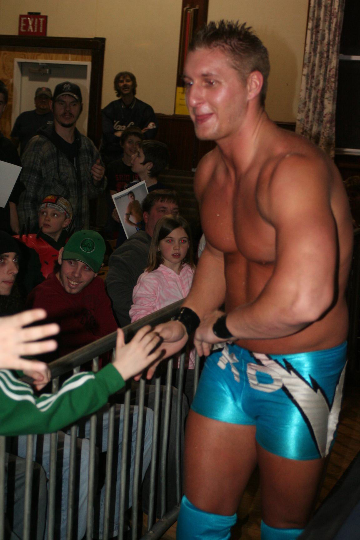 The Wrestler Ken Doane (kenny Dykstra)